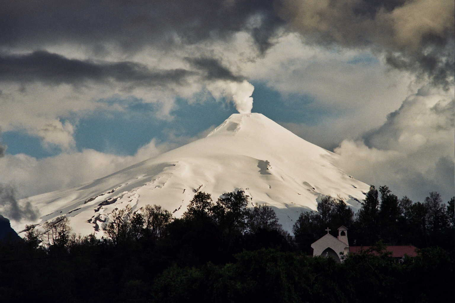 Villarrica Volcano smoking